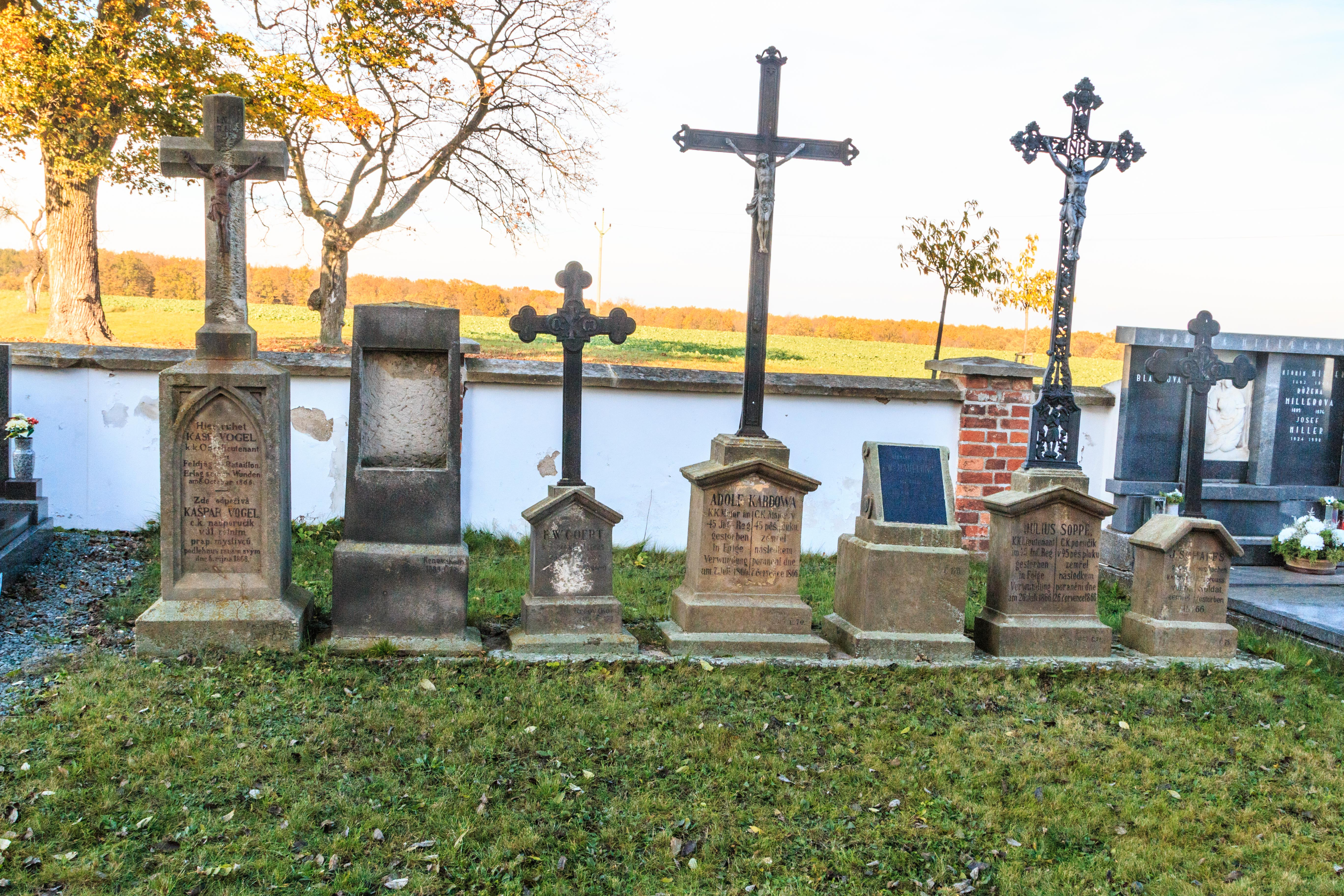 Pomníky padlých v bitvě u Hradce Králové u kostela v Hrádku